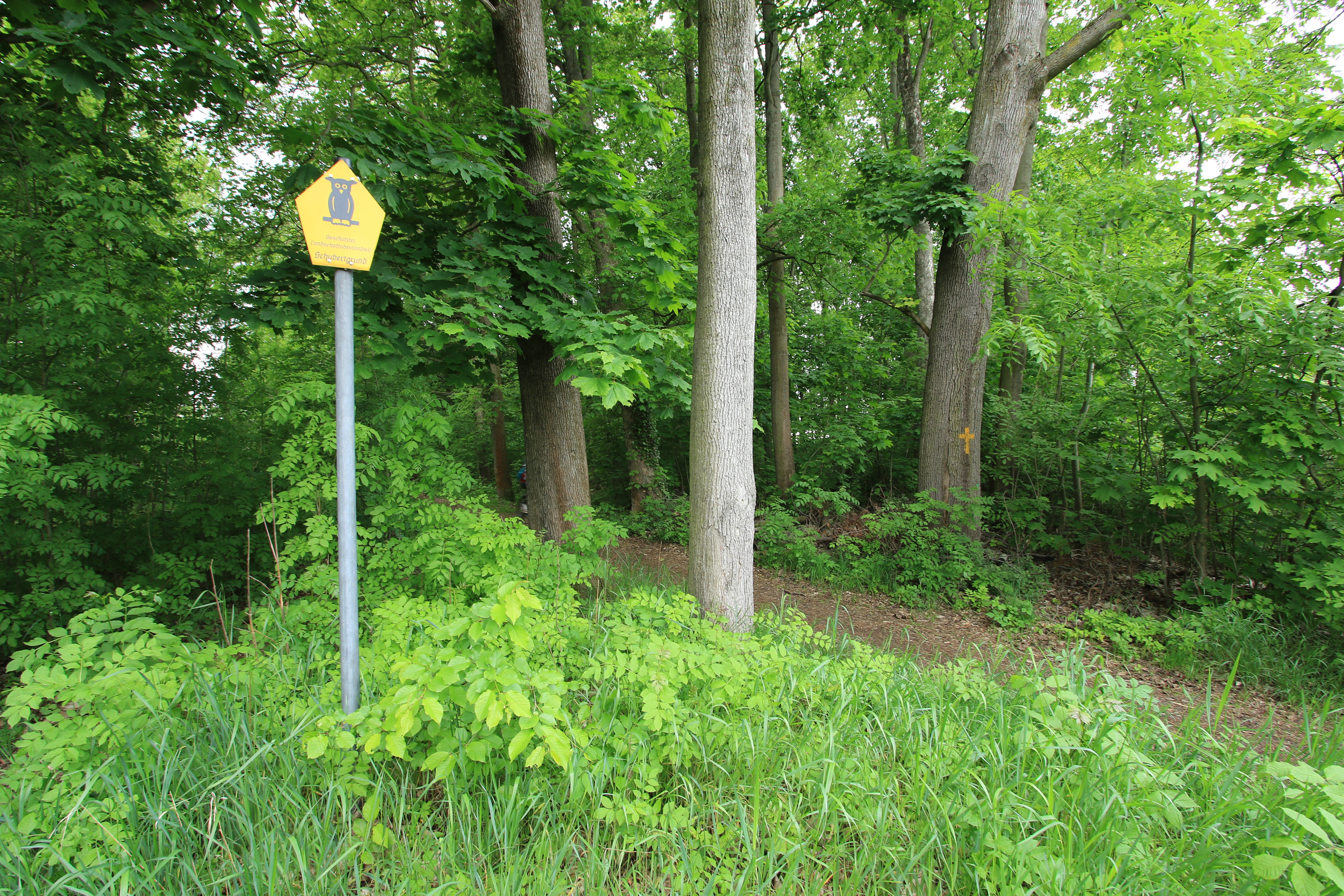 Geschützter Landschaftsbestandteil Schubertgrund in Lichtenstein. Landkreis Zwickau Sachsen. 09350 Am Schubertgrund Strasse 9.